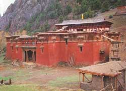 Kloster Karma Gompa, Gründungskloster der tibetisch-buddhistischen Schulrichtung der Karma-Kagyüpa